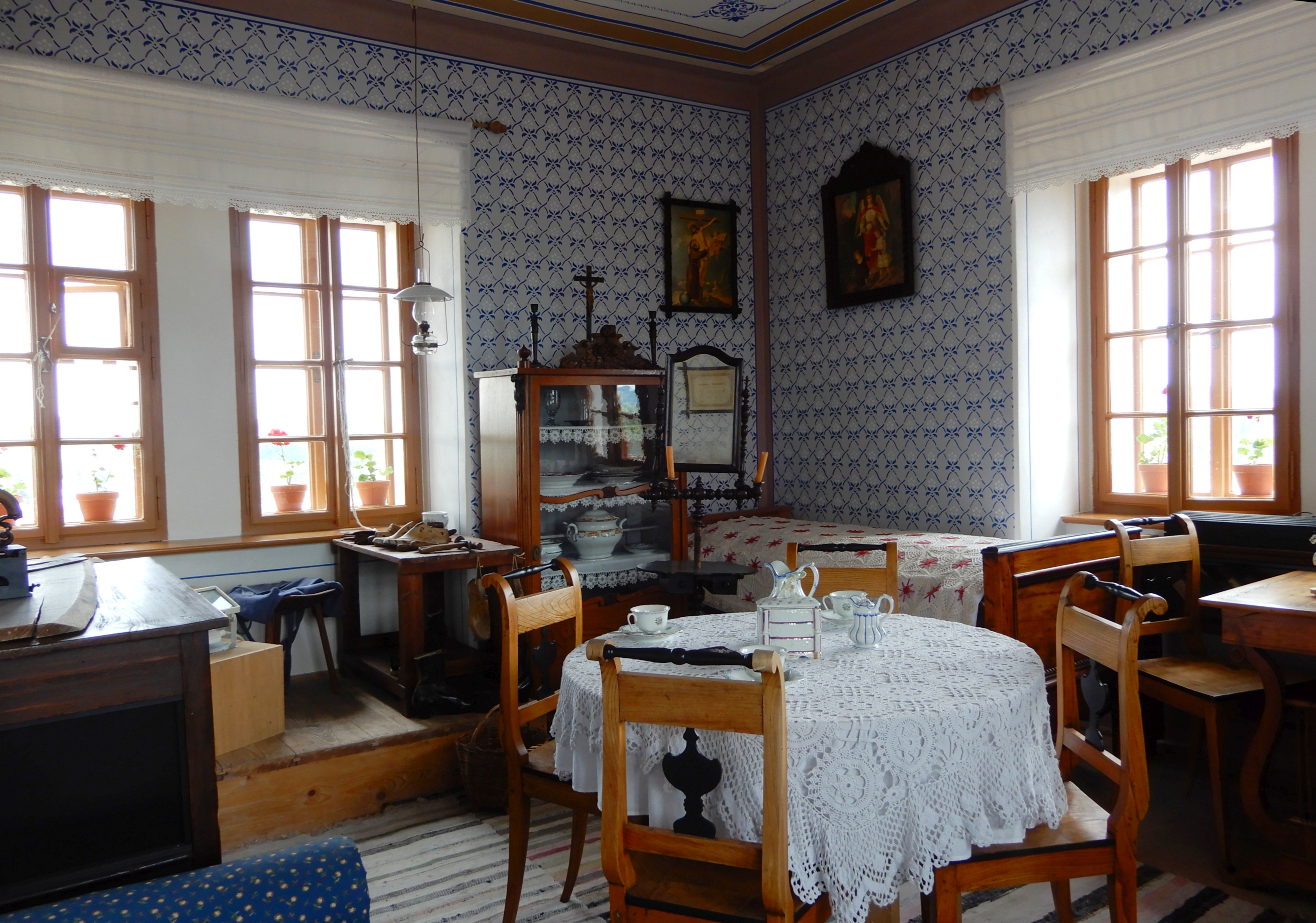 Polička, rodná světnička Bohuslava Martinů v ochozu kostelní věže